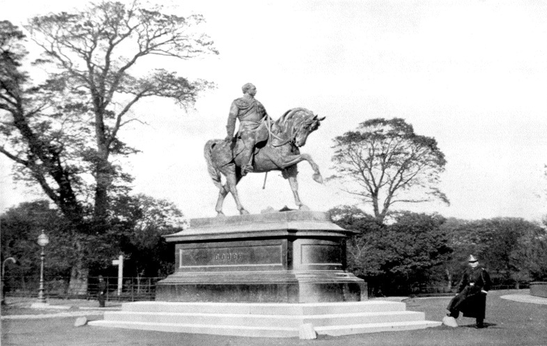 Gough Monument, Phoenix Park, Dublin